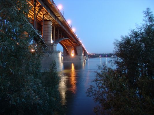 Новосибирск. Коммунальный мост